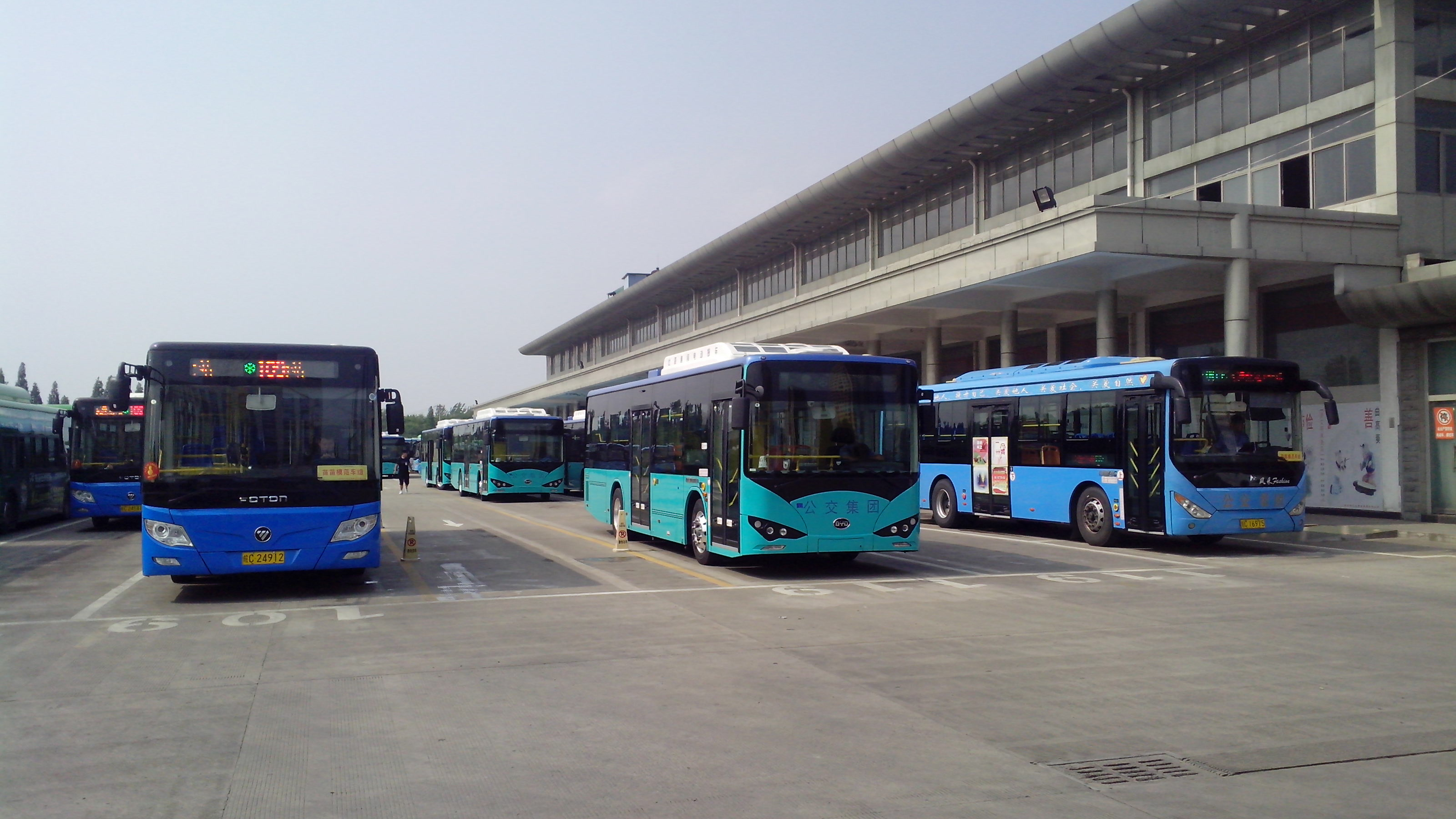 中文（中国大陆）: Bengbu Bus No.109&119&135 at S.Passenger Station